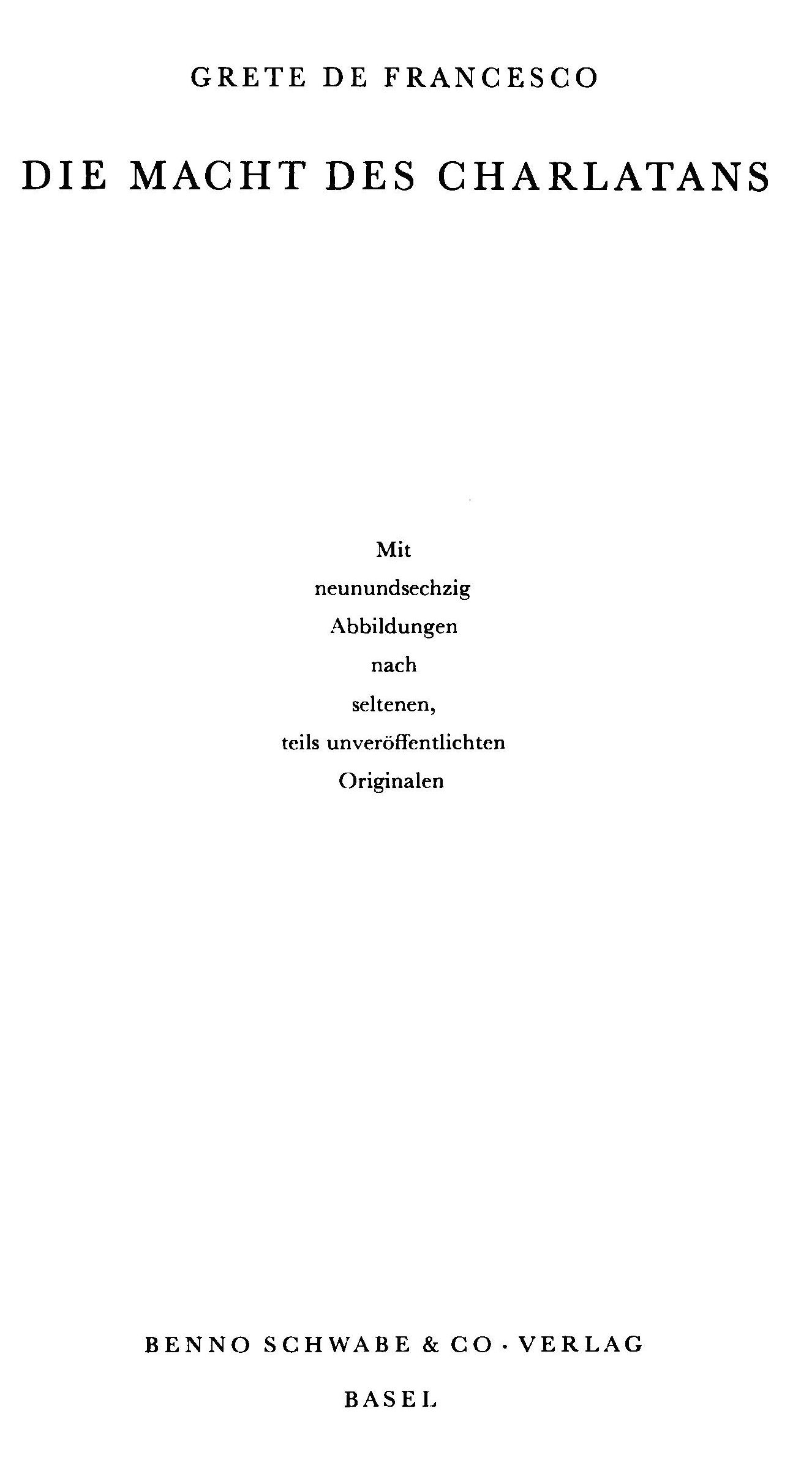 Grete de Francesco Die Macht des Charlatans 1937 Titel